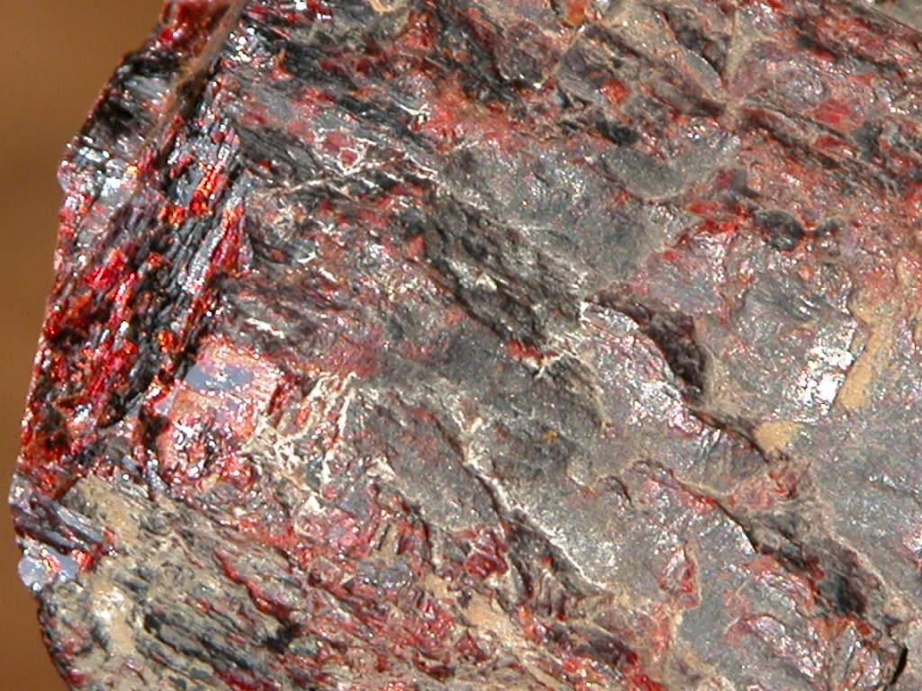 Zincite